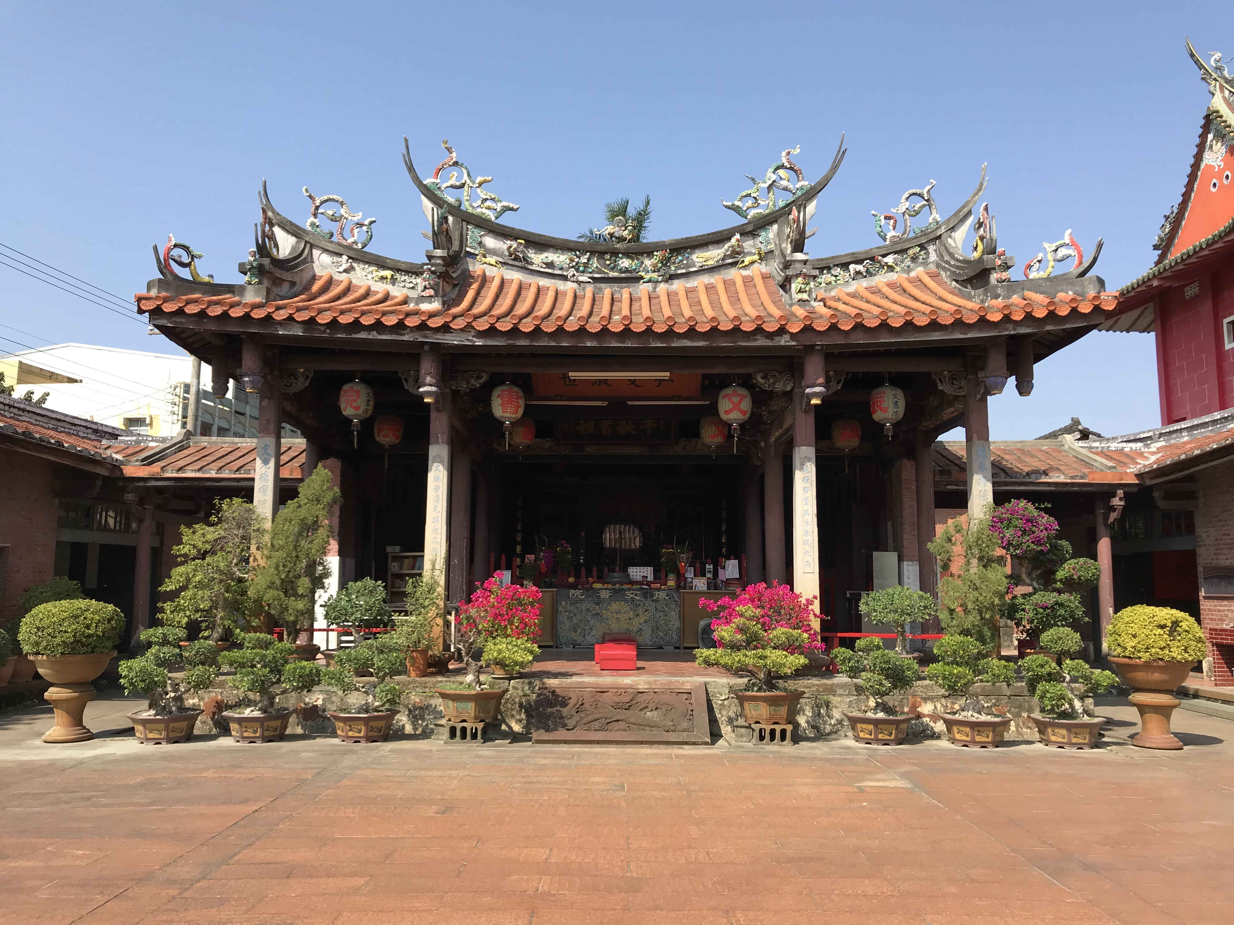 振文書院主殿